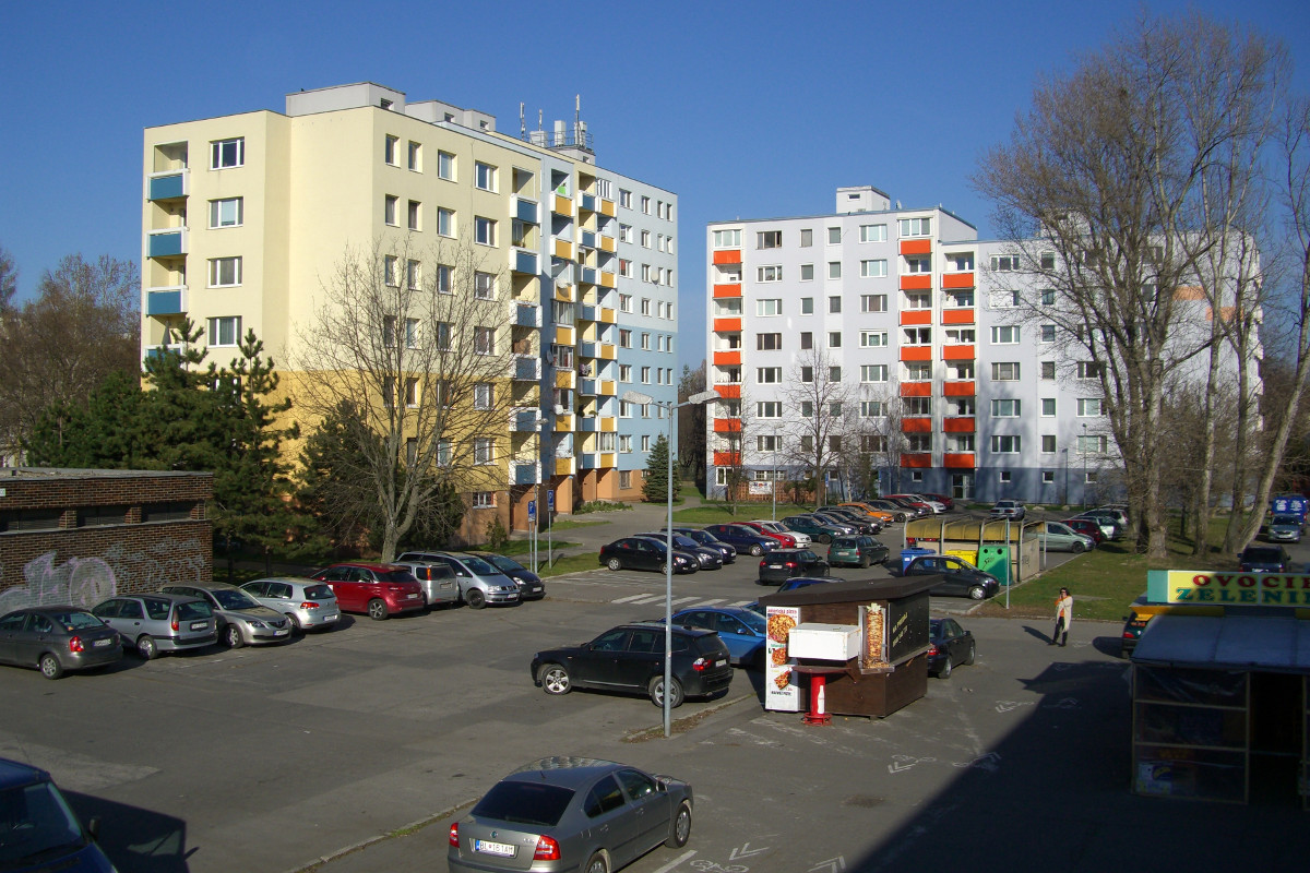 Seberiniho ulica - koniec, Bratislava/Ruzinov/Posen